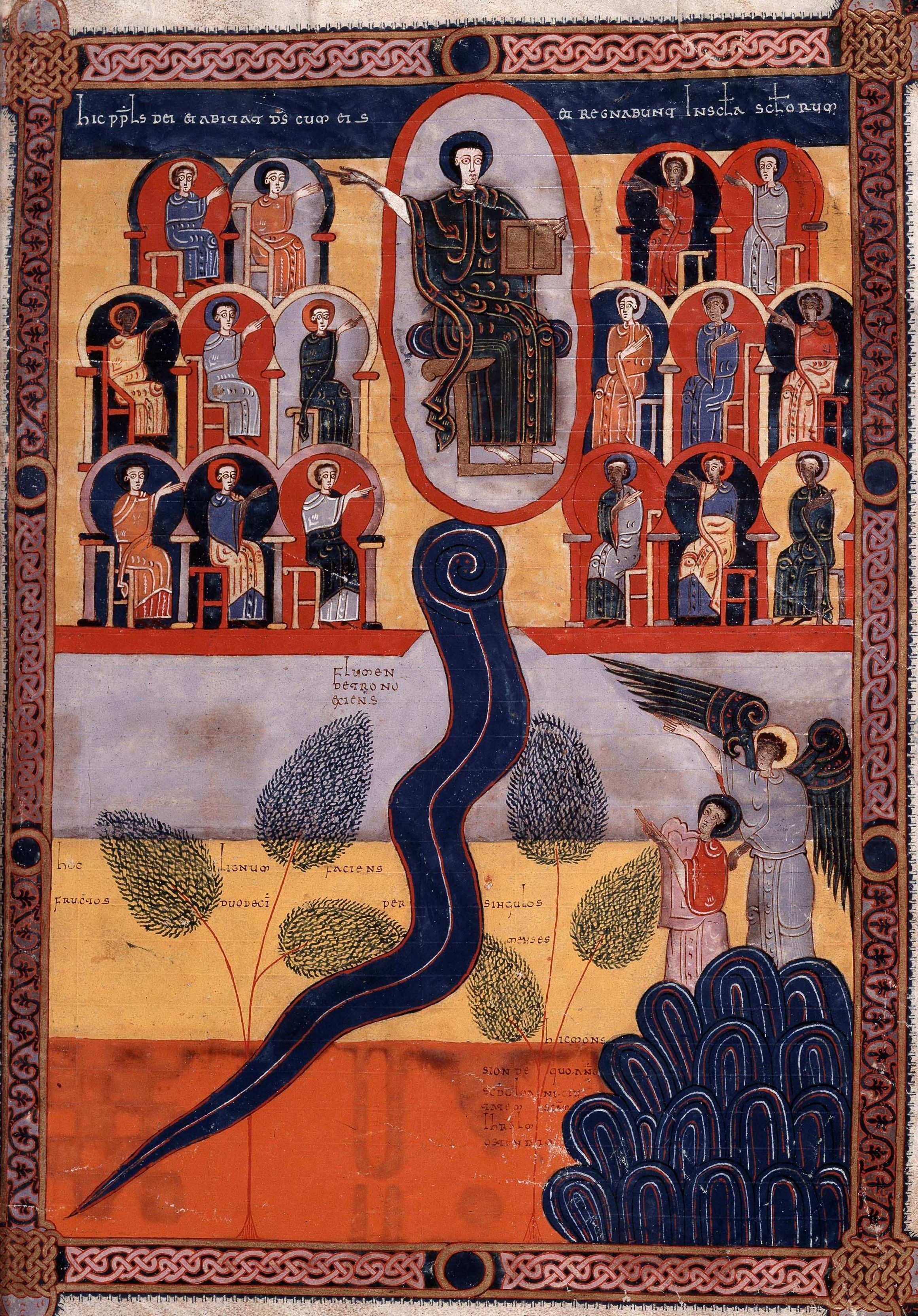 La Jérusalem nouvelle. Le Fleuve de Vie. L'Arbre de Vie. Apoc. XXII